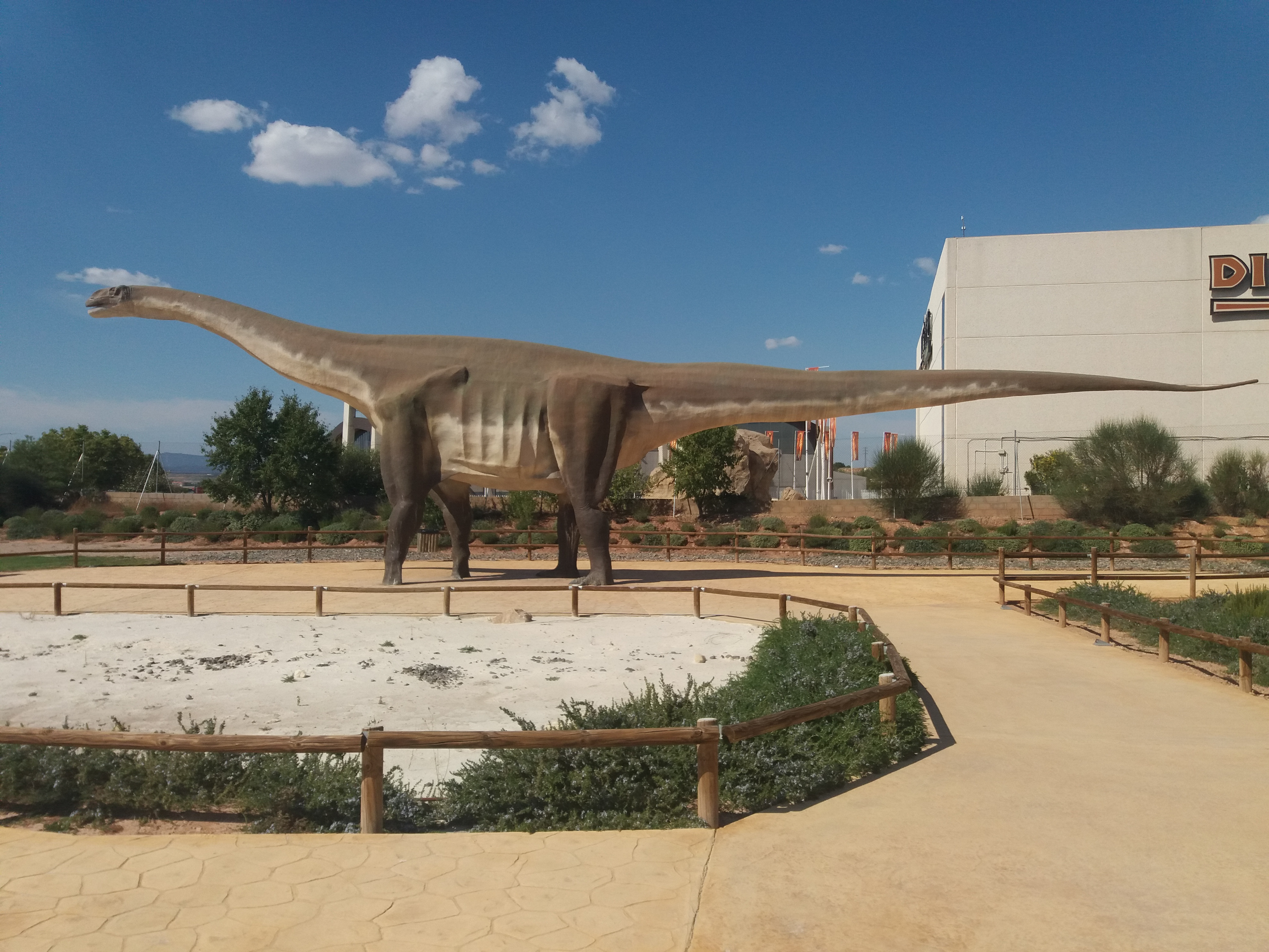 Réplicas de dinosaurios en Dinópolis (Teruel - España).